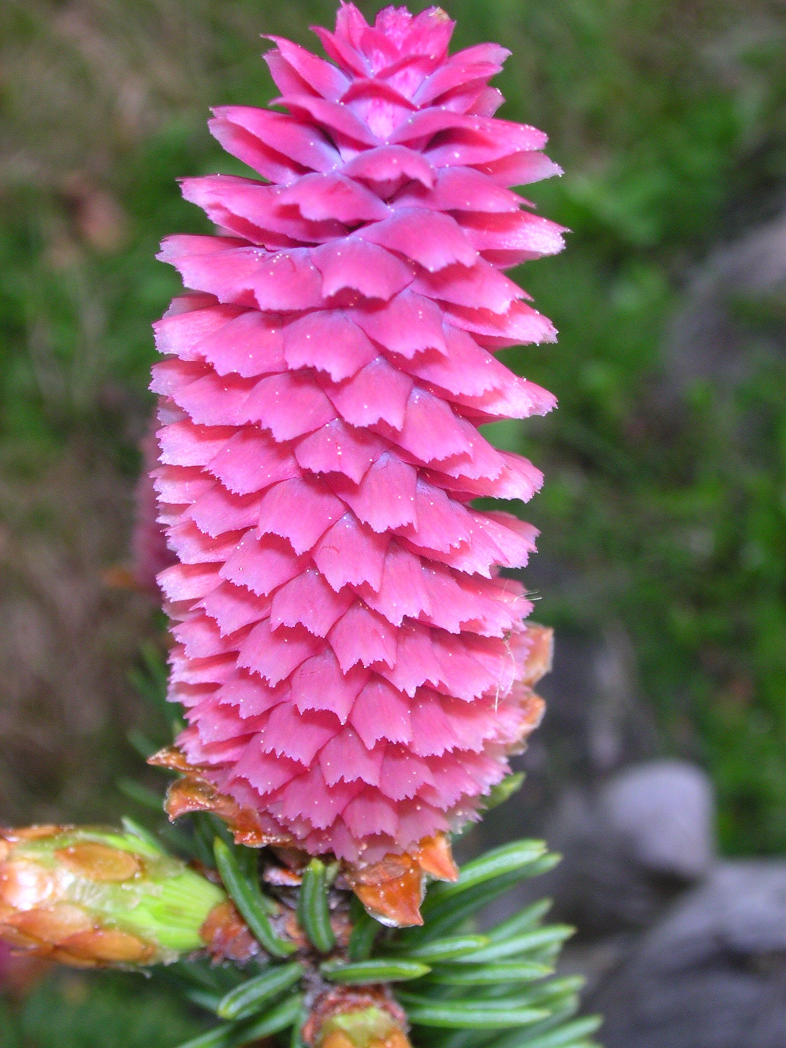 Picea abies